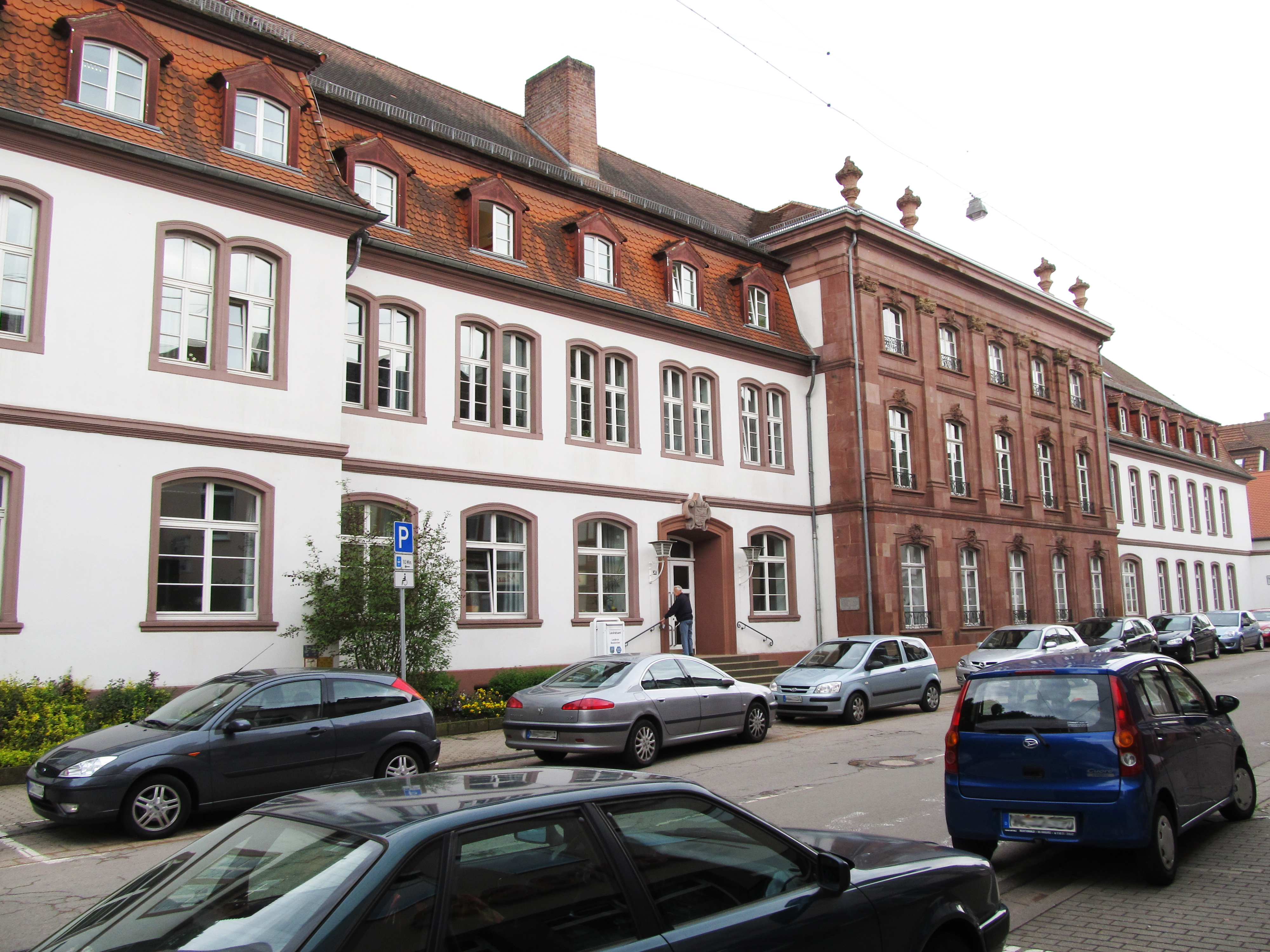 Ottweiler Witwenpalais Landratsamt. Zeitweise Witwensitz der Fürstin und Musikerin Sophie Erdmuthe von Nassau-Saarbrücken (* 12. Juli 1725 in Erbach;† 10. Juni 1795 in Aschaffenburg), Gemahlin des Wilhelm Heinrich Fürst von Nassau-Saarbrücken (* 6. März 1718 in Usingen; † 24. Juli 1768 in Saarbrücken), seit 1741 bis zu seinem Tod Fürst von Nassau-Saarbrücken